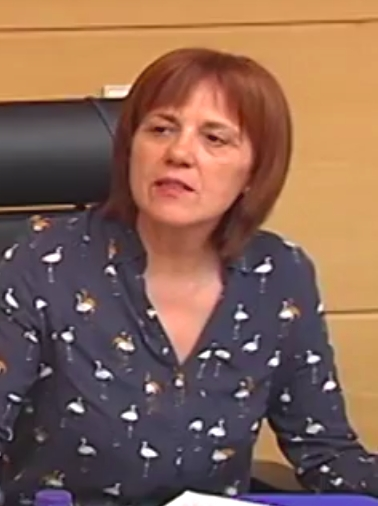 María Consolación Pablos Labajo, 2017, en una comisión de las Cortes de Castilla y León.